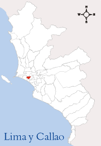 Localización del Distrito de Pueblo Libre Imagen elaborada por --Edgardo Reyes 21:58 9 mar, 2005 (CET) Categoría:Mapas del Perú (imagen)